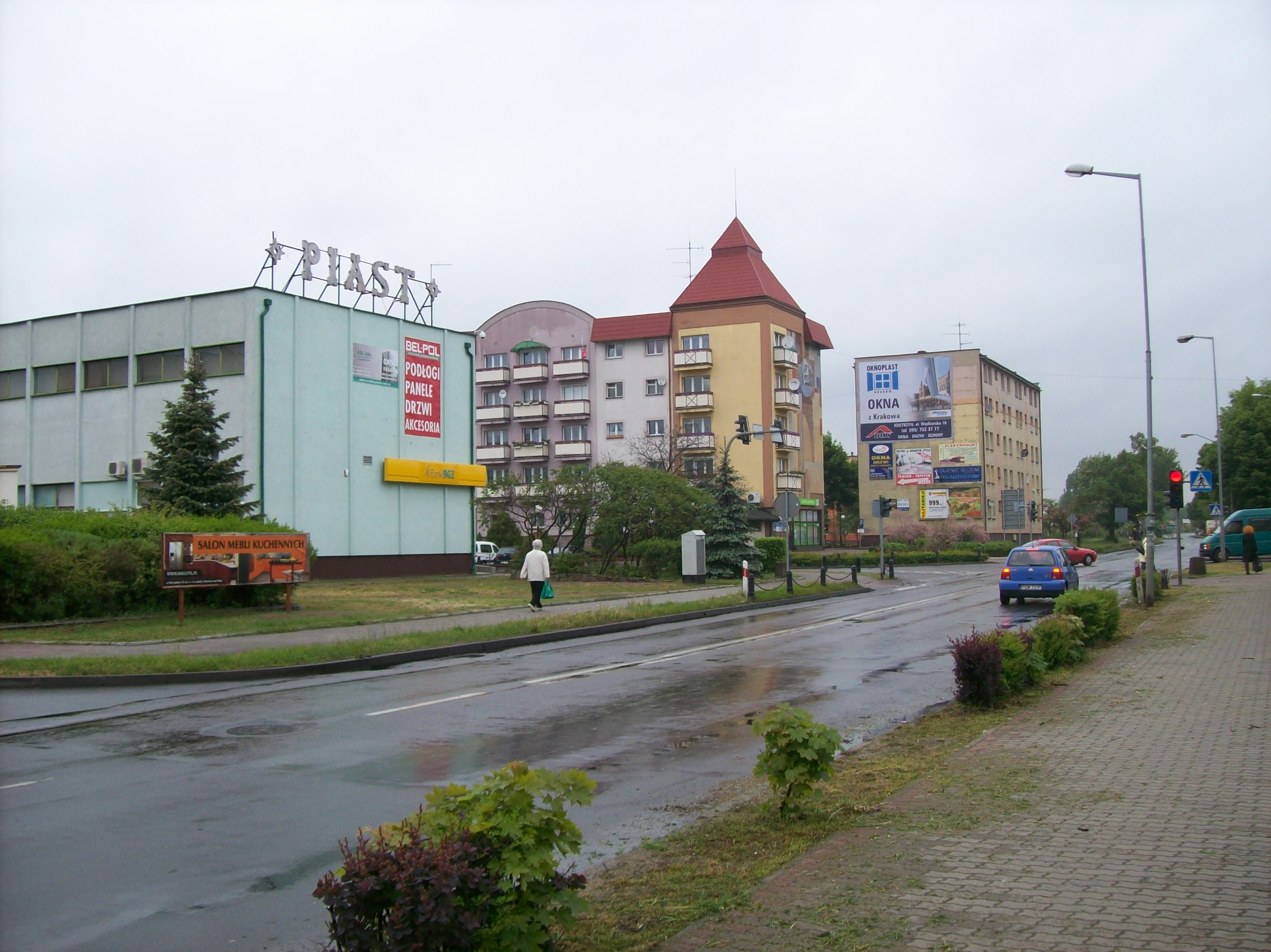 Centrum miasta.